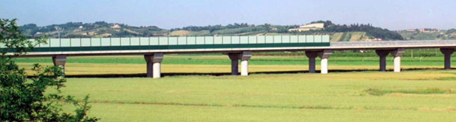 Un tratto della Secante di Cesena in campagna.